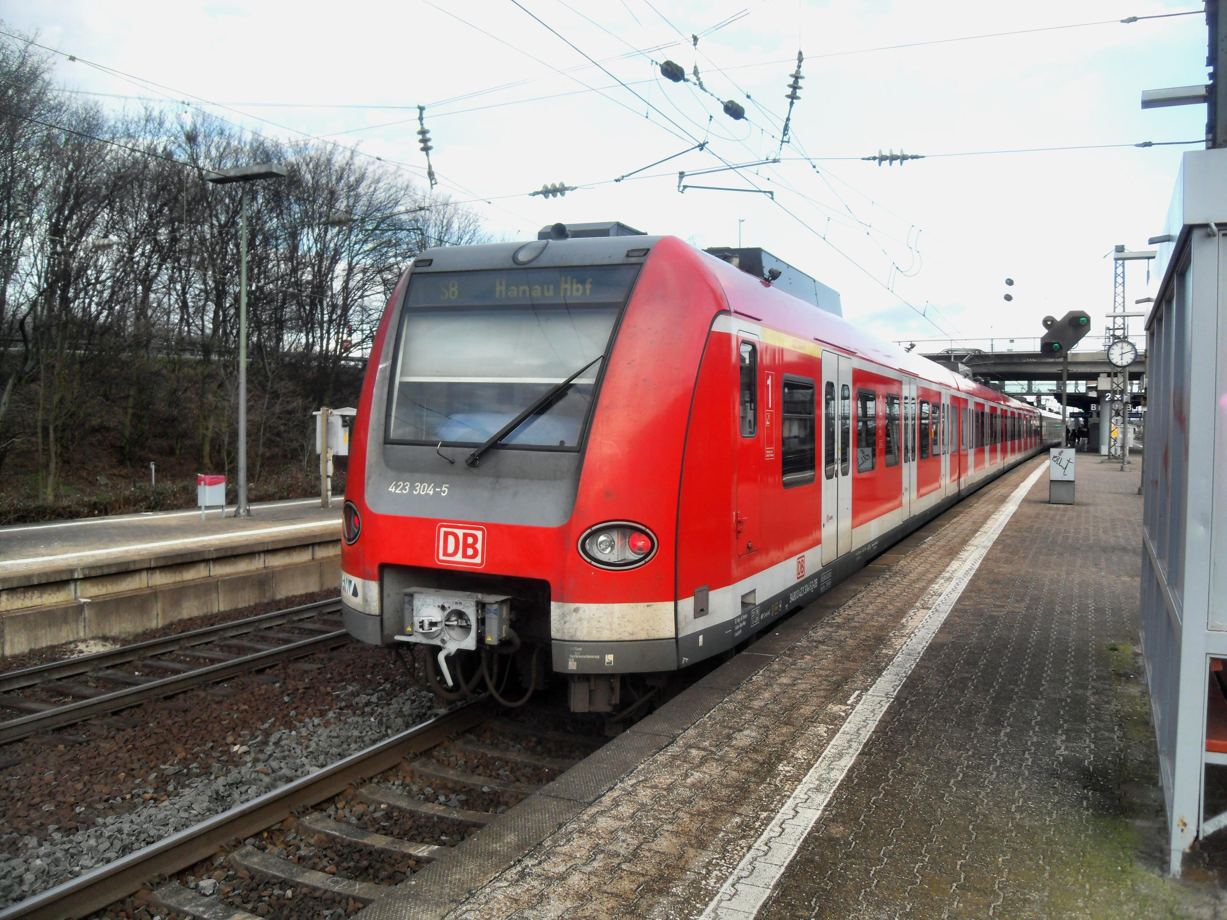 S8 der S-Bahn Rhein-Main der Baureihe 423 im Mainz-Bischofsheimer Bahnhof auf dem Weg nach Hanau